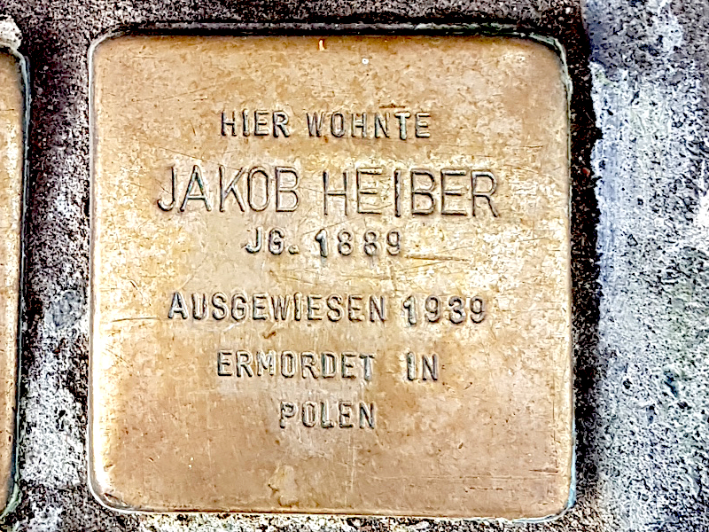 Stolperstein für Jakob Heiber, Jg. 1889, ausgewiesen aus Duisburg 1939, ermordet in Polen